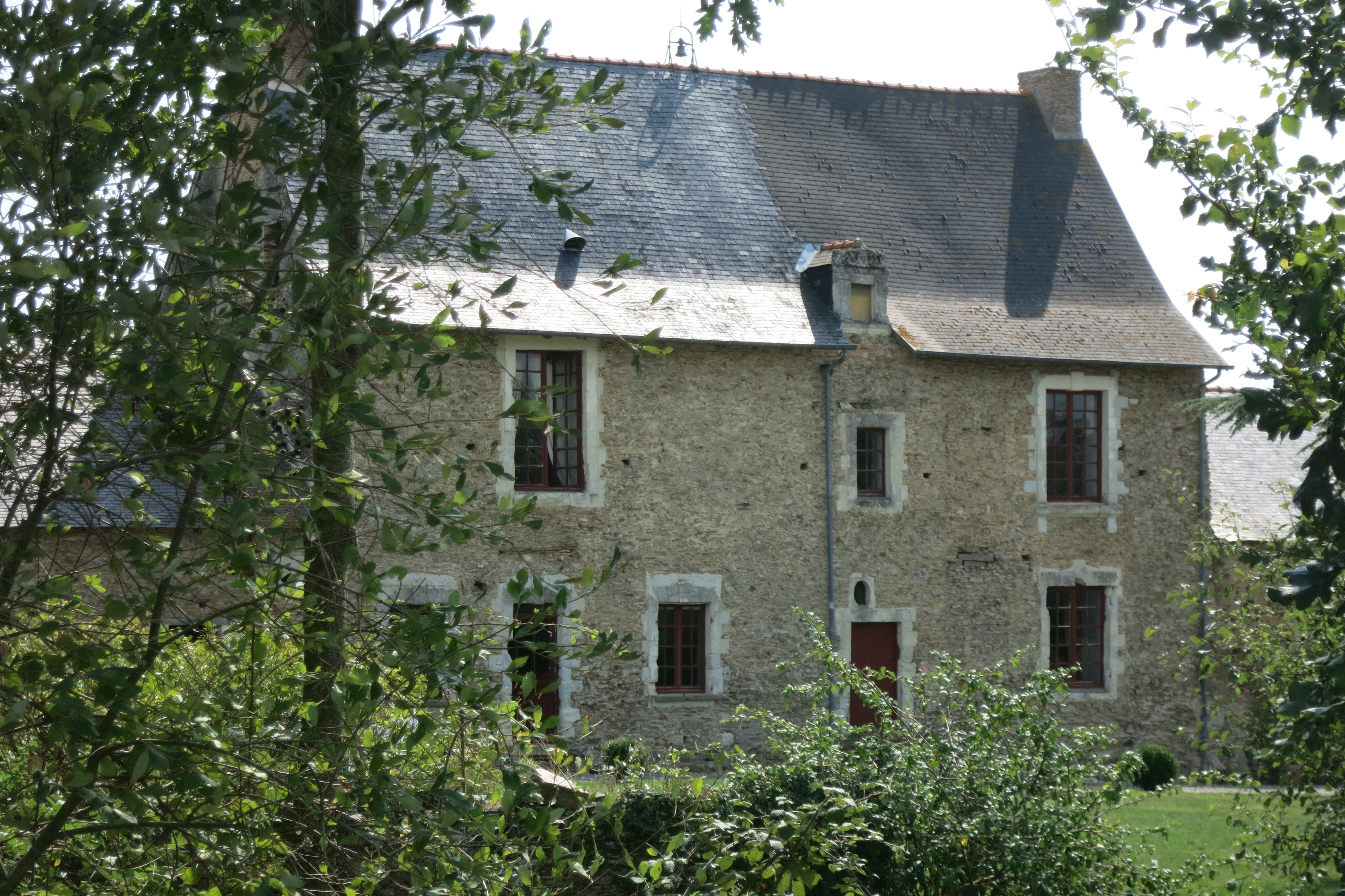 Façade ouest du Logis des Tuffades